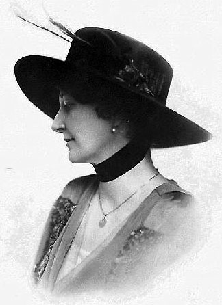 Valborg Hansson